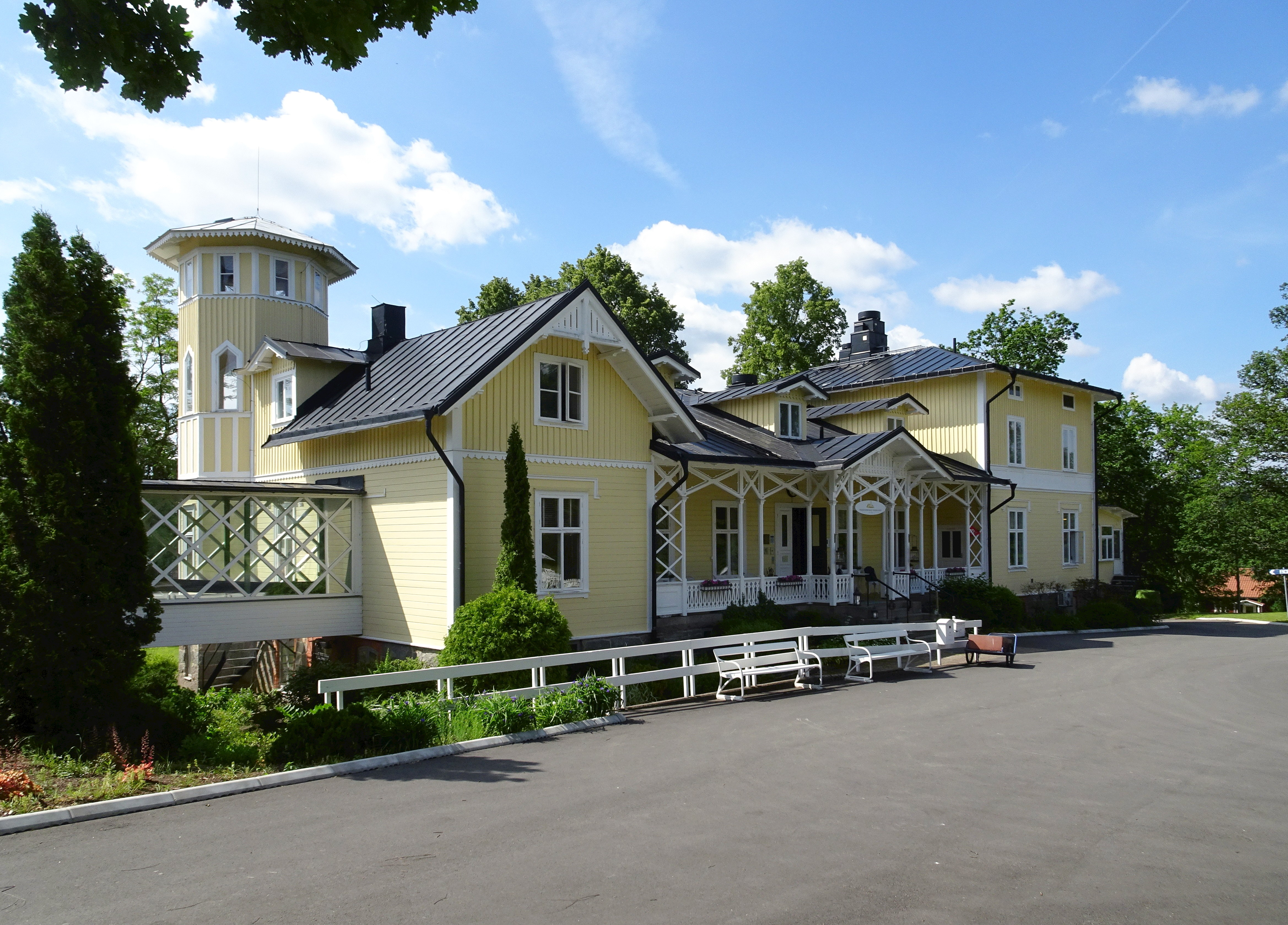 Fredensborgs herrgård entrésidan